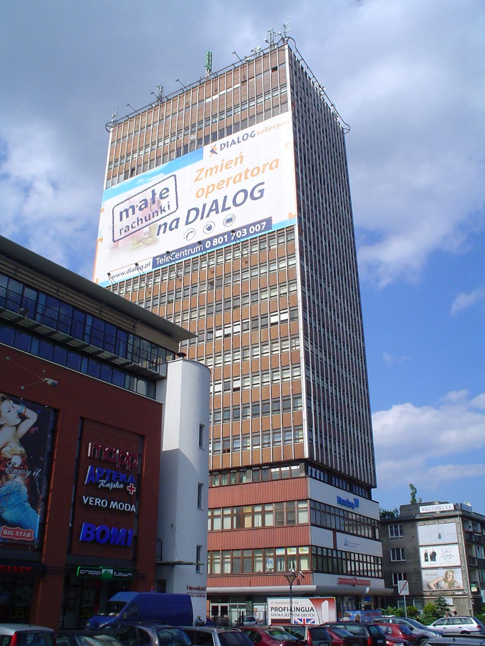 Biurowiec Organika Trade i fragment Galerii Handlowej Madison.